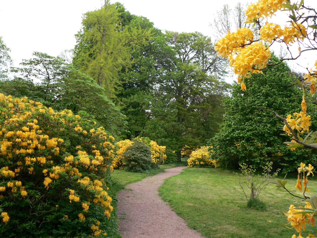 Ohrbergpark